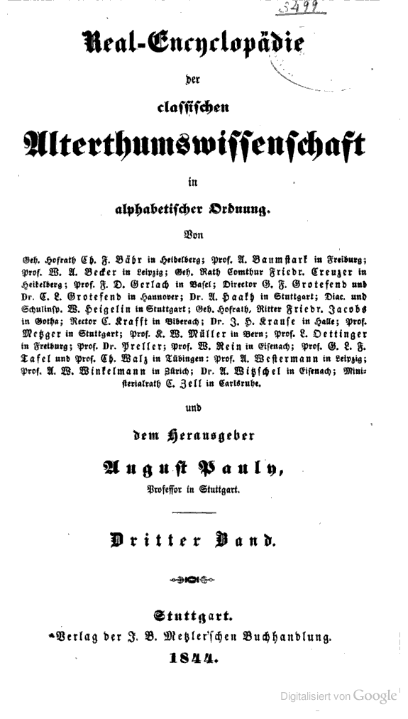 Frontispiece of August Friedrich Pauly's Real-Encyclopädie der classischen Alterthumswissenschaft in alphabetischer Ordnung, volume 3 (Stuttgart 1844)